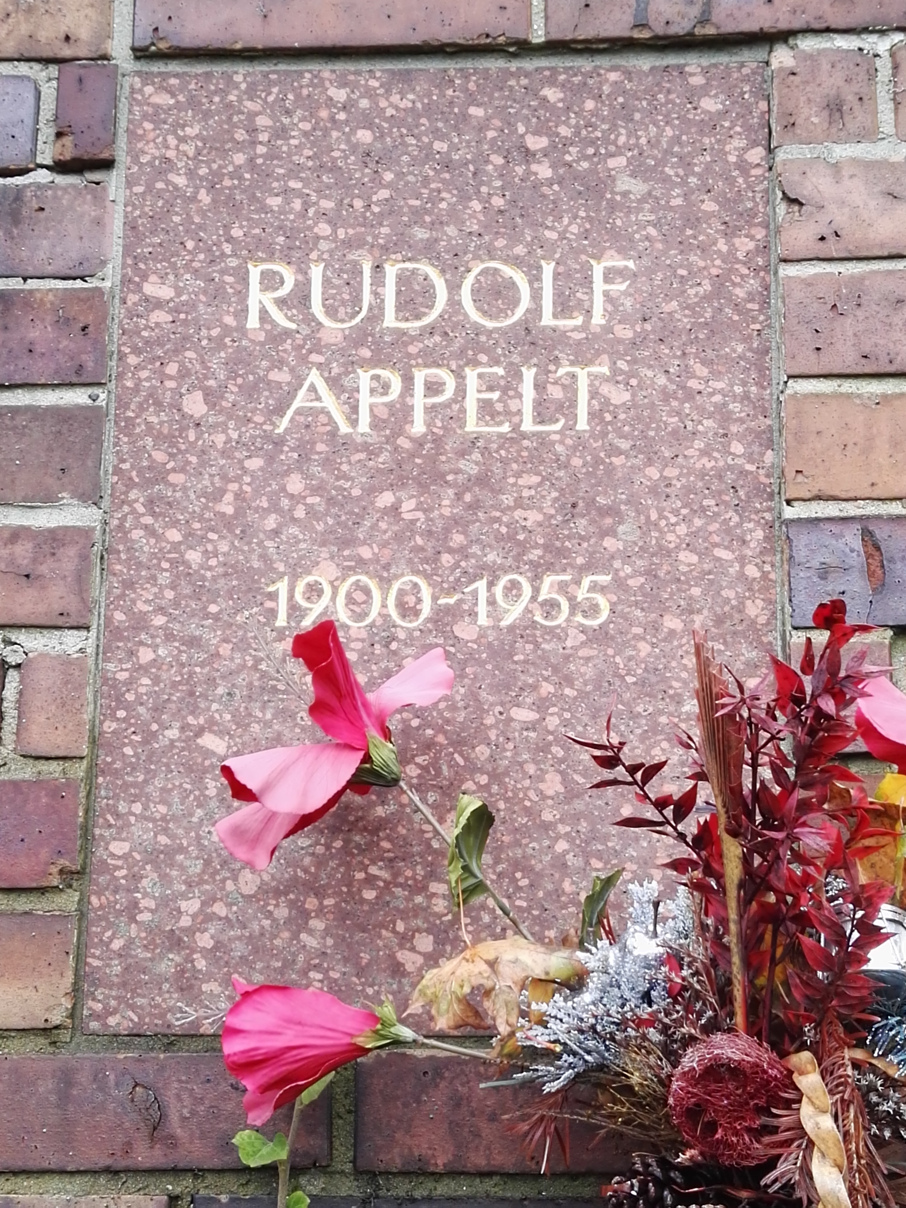 Grab von Rudolf Appelt in der Gedenkstätte der Sozialisten auf dem Zentralfriedhof Friedrichsfelde in Berlin-Lichtenberg